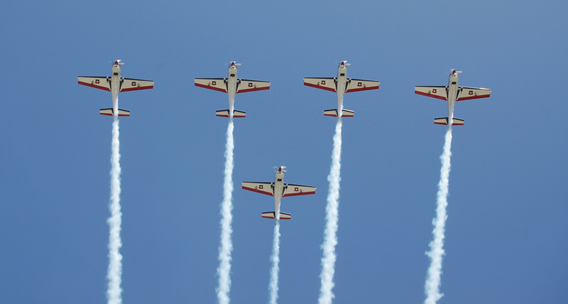 Halcones